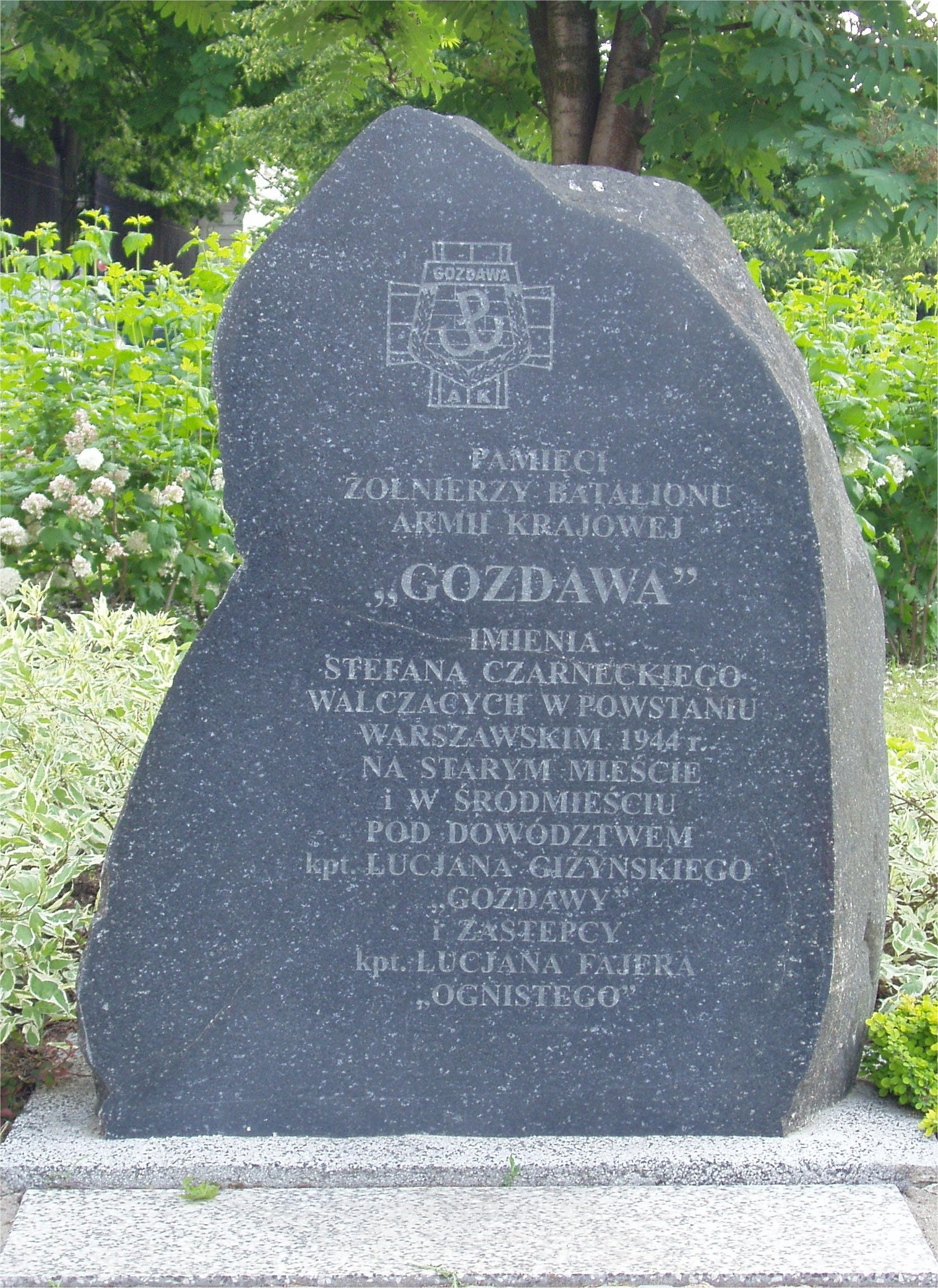 Kamień pamiątkowy u zbiegu ulic Sanguszki i Zakroczymskiej w Warszawie (fot Zu)